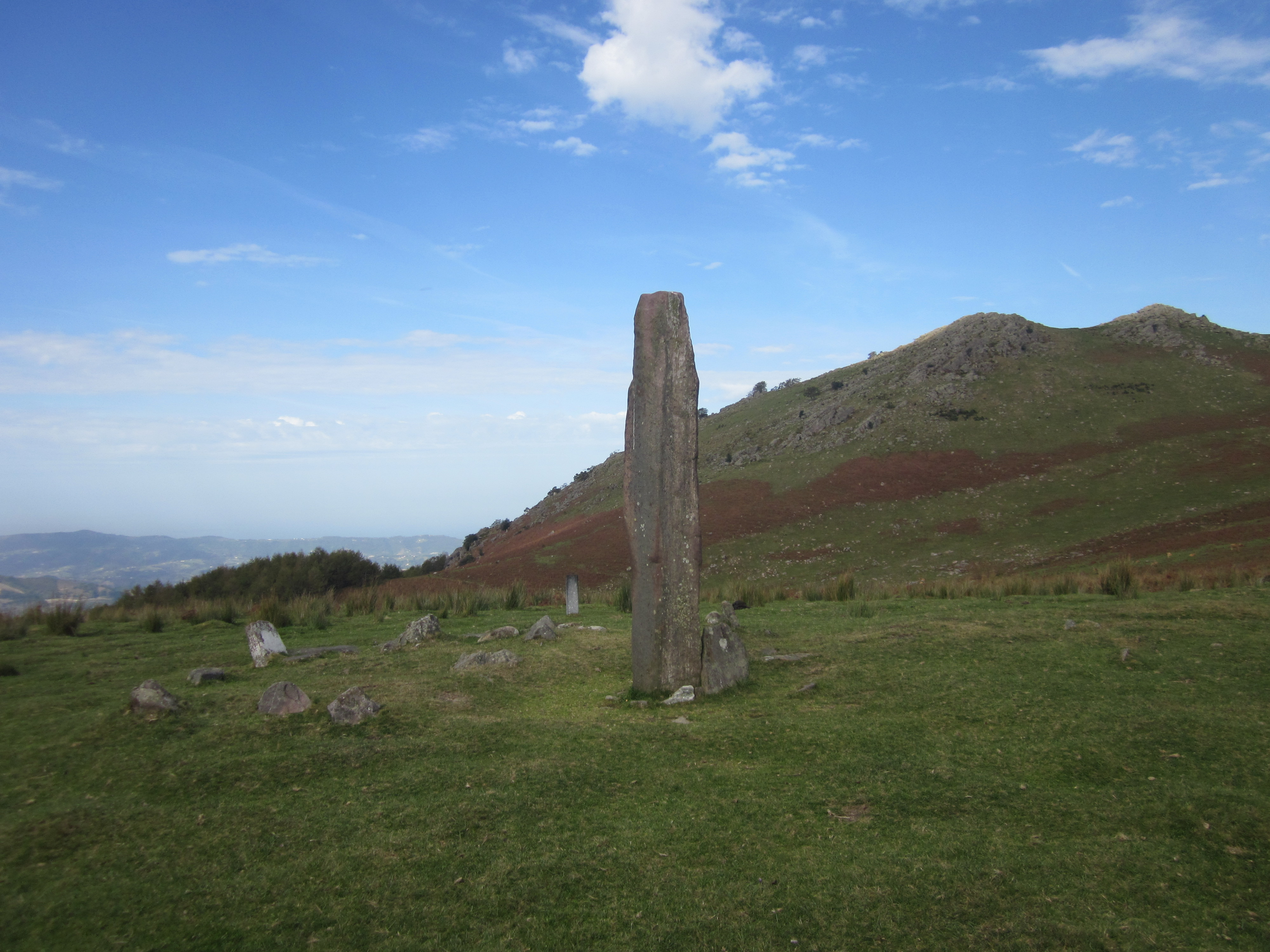 Menhir de Eteneta avec le mont Adarra.